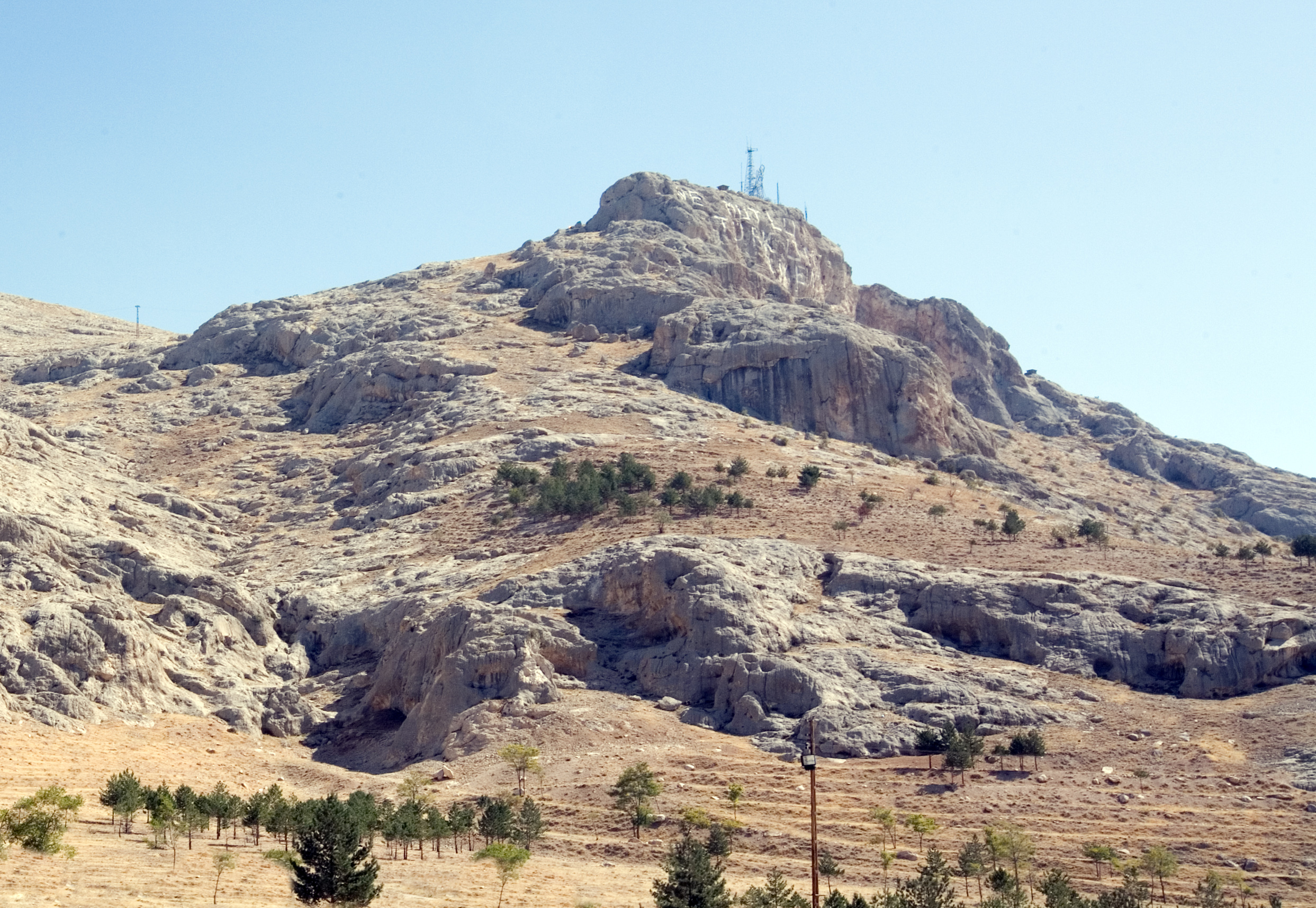 Overview